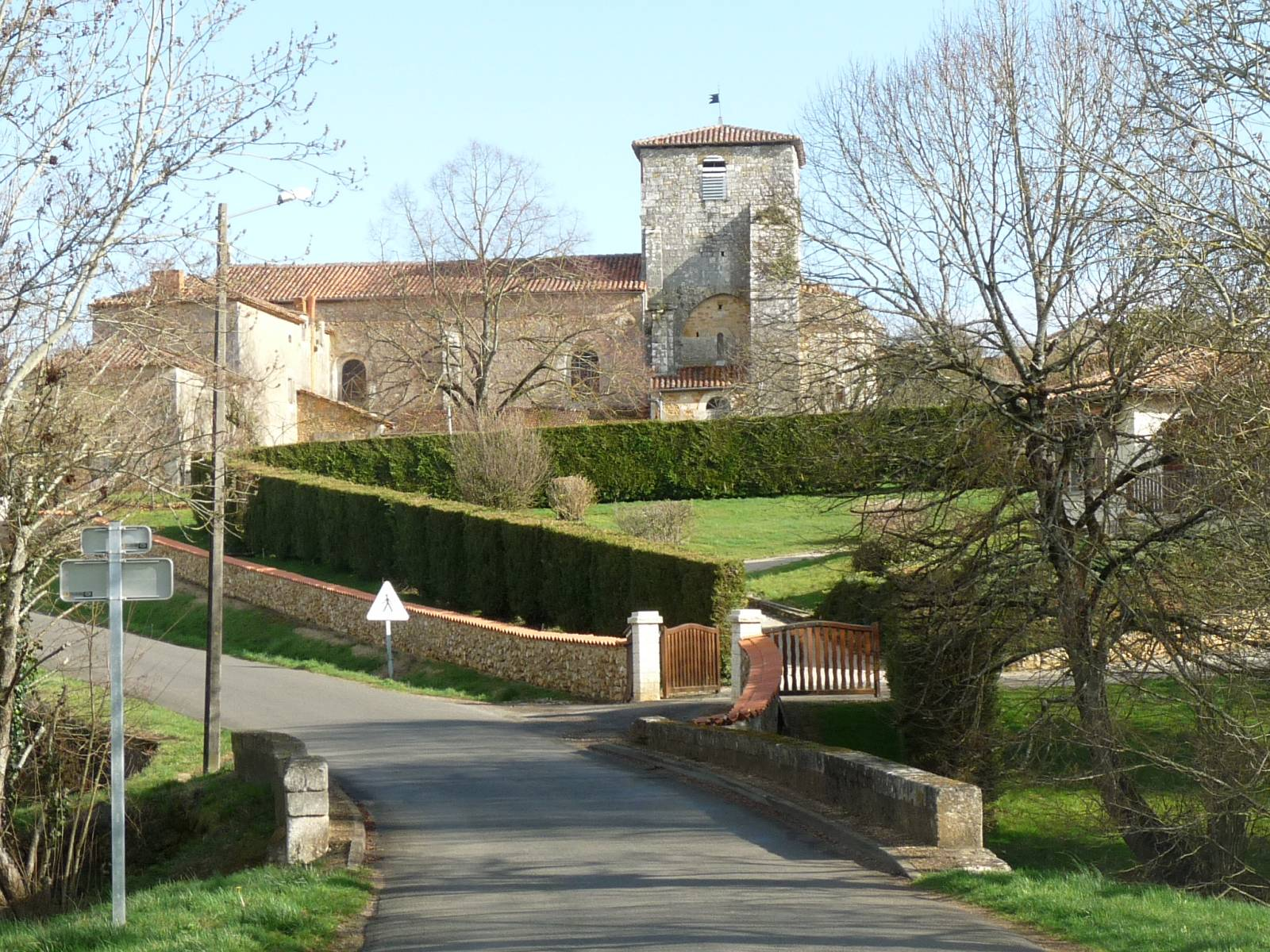 église d'Yvrac, Yvrac-et-Malleyrand, Charente, France